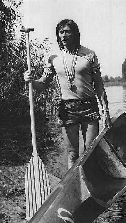 Sursa: COR